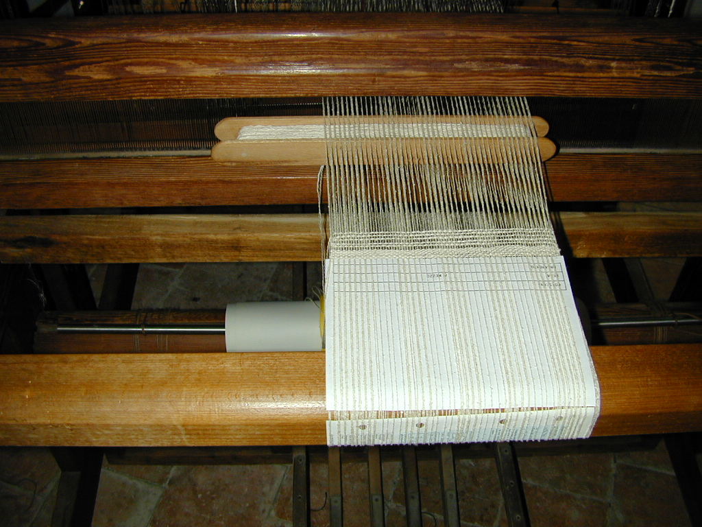 Foto mia personale, navetta inserisce la trama nel passo Licensing Categoria:Immagini sulla tessitura